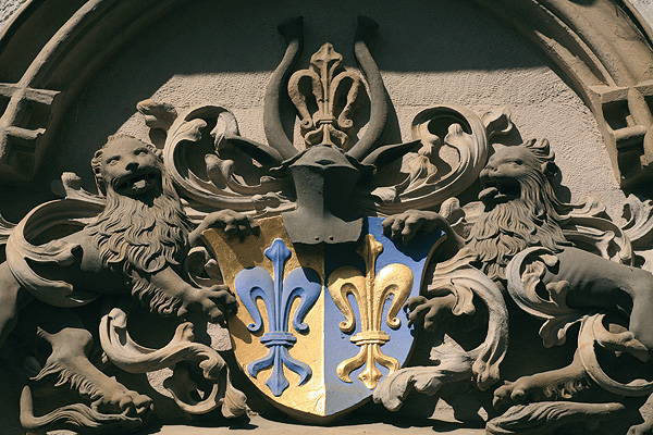 Augsburg, Fuggerhaus am Heu- und Rindermarkt, Ostportal (spätgotisches Prunkportal) an der Philippine-Welser-Straße, Wappen der Fugger von der Lilie, verliehen 1473